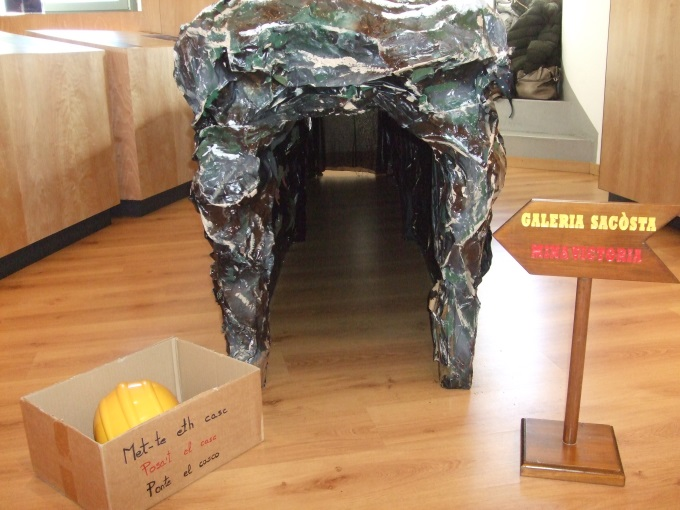 Joc per als infants. Reproducció d'un túnel de la Mina Victòria.